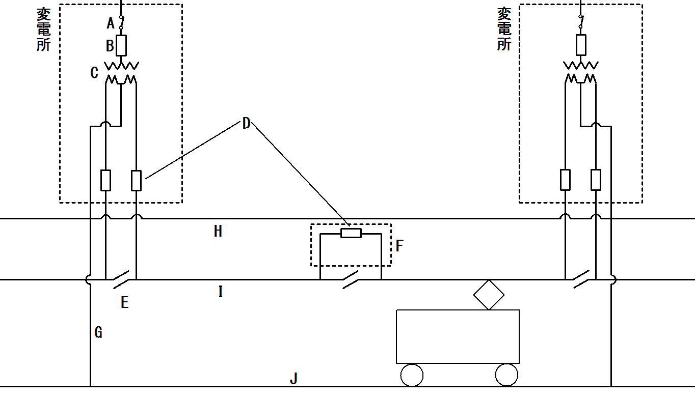 交流き電系統のモデル図。A断路器、B受電用遮断器、C変圧器、Dき電用遮断器、Eエアセクション、Fき電区分所、G帰線、Hき電線又は負き電線、Ｉ電車線、Jレール。